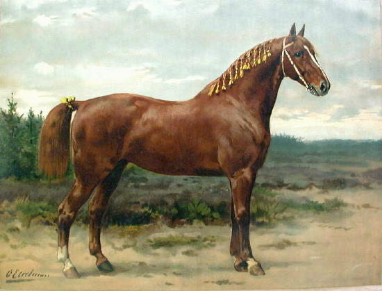 Gelderlander horse